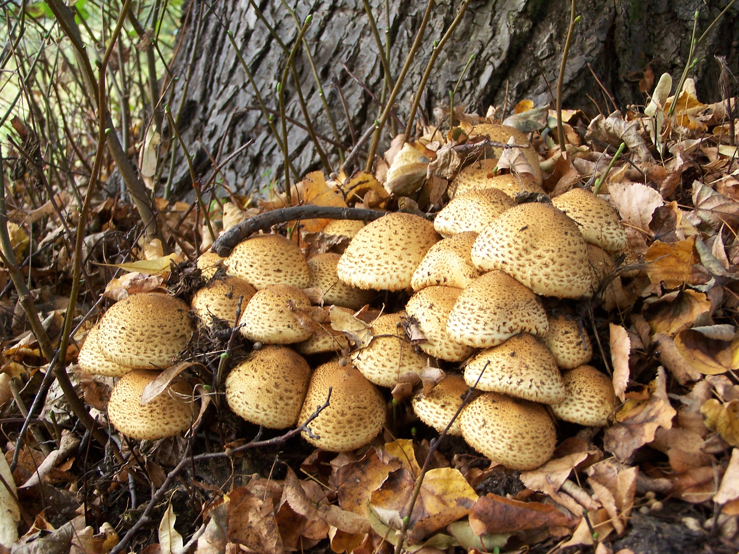 Łuskwiak nastroszony (Pholiota squarrosa). Zdjęcie wykonano w Rudach Wielkich (Raciborskich).